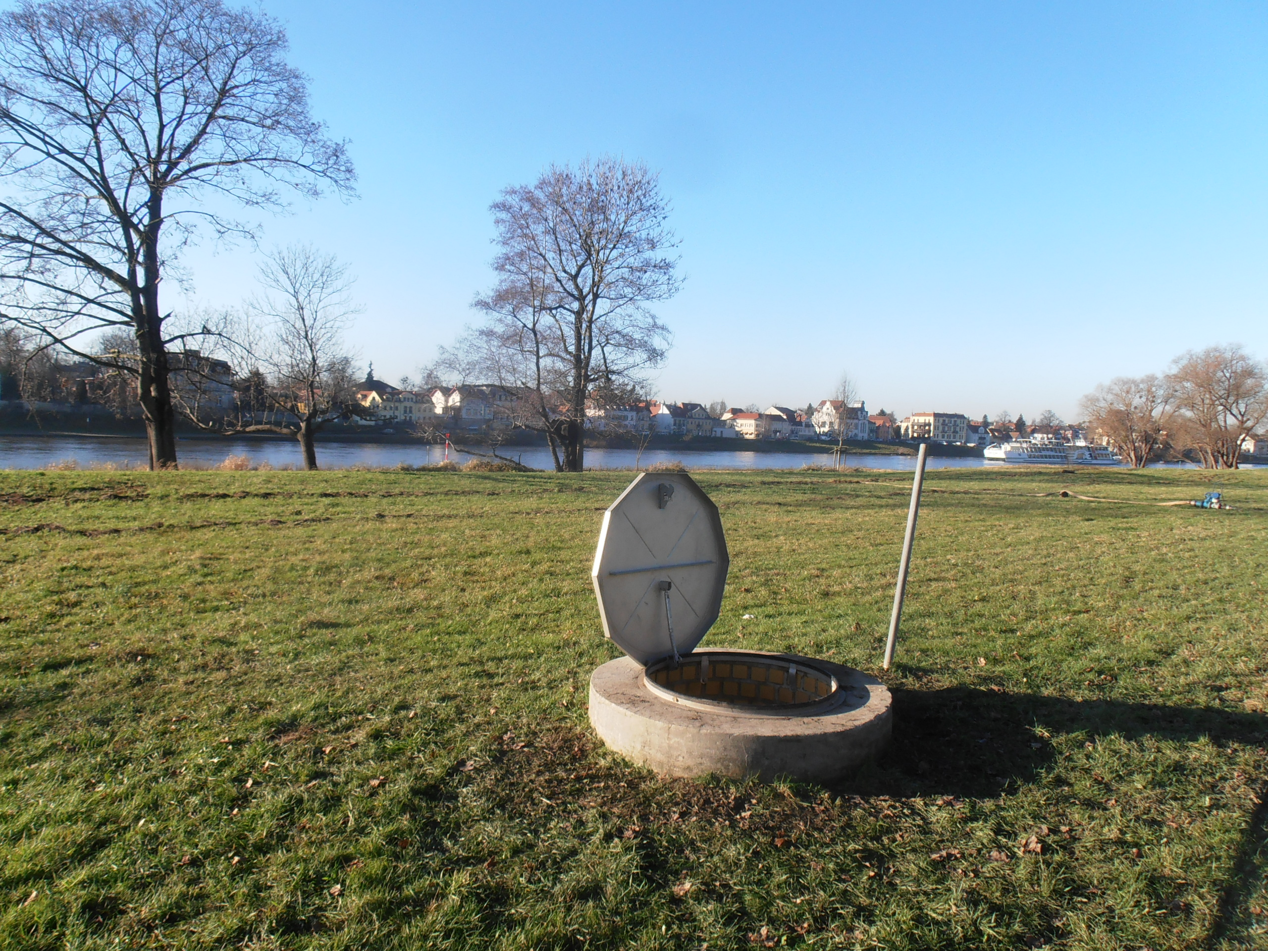 Brunnen im Wasserwerk Hosterwitz, im Hintergrund die Elbe